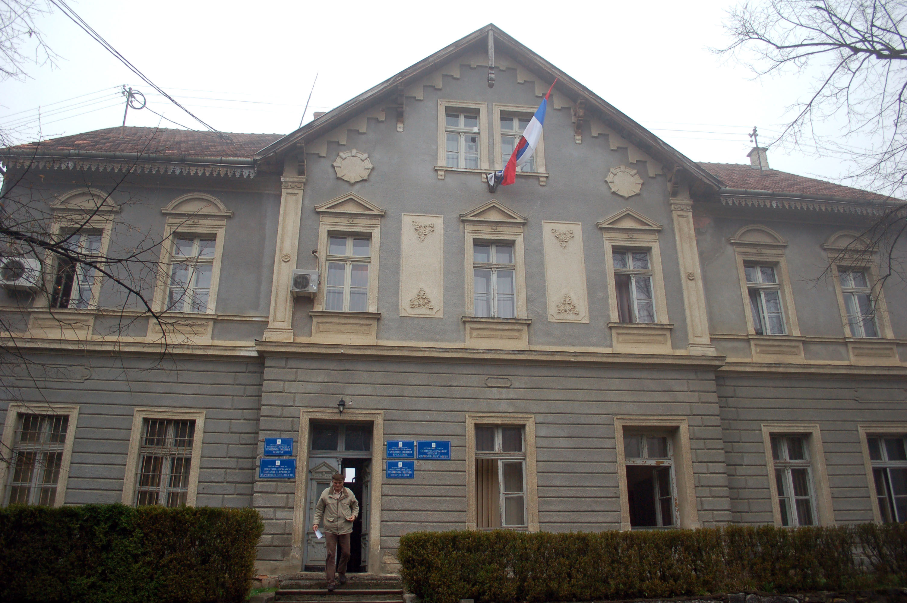 Zgrada opstine Prnjavor This image was uploaded as part of Trace of Soul 2015.